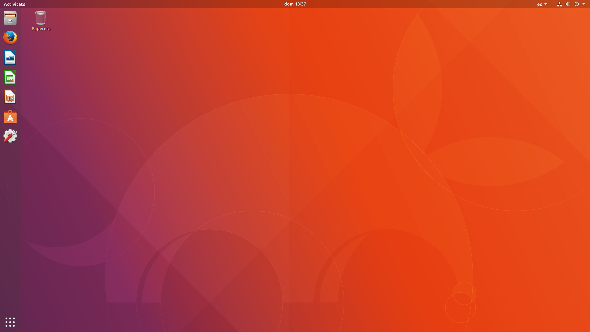 Captura de pantalla d'Ubuntu 17.10 en Català